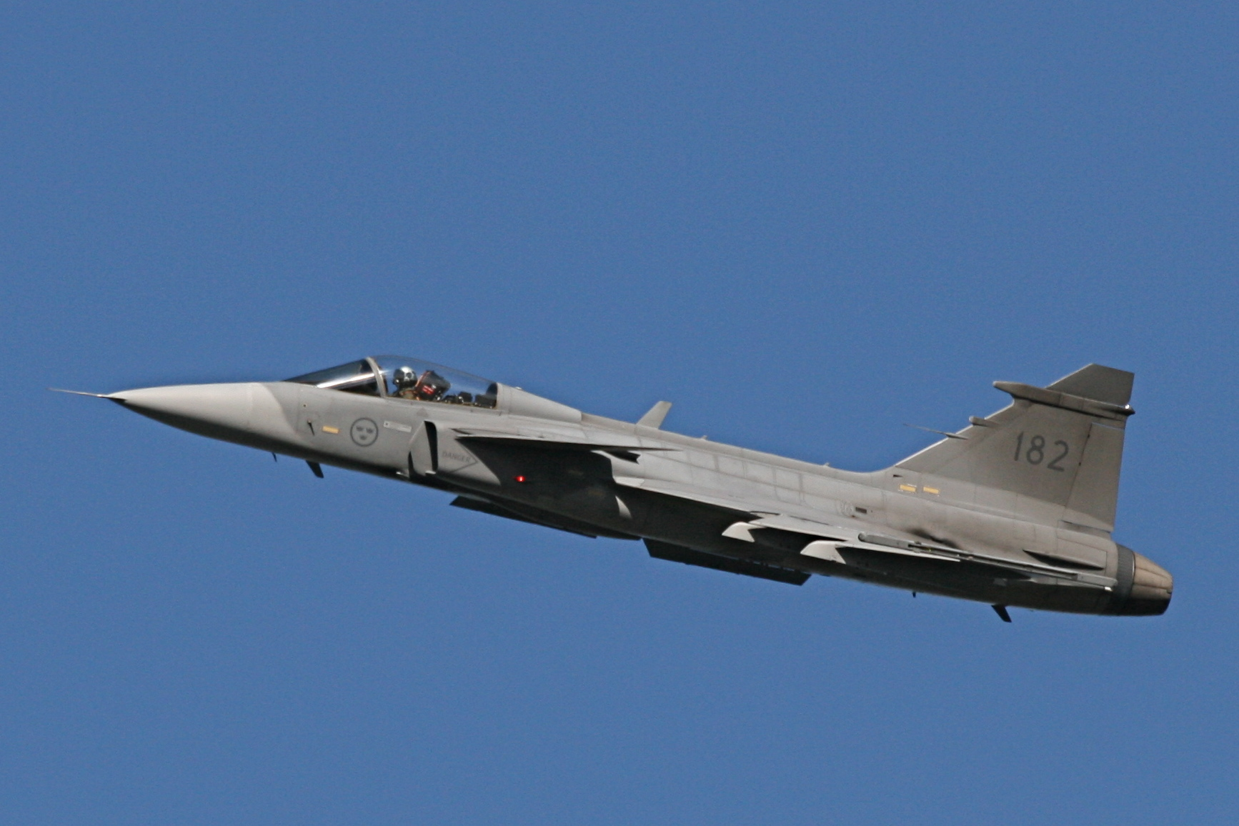 JAS Gripen